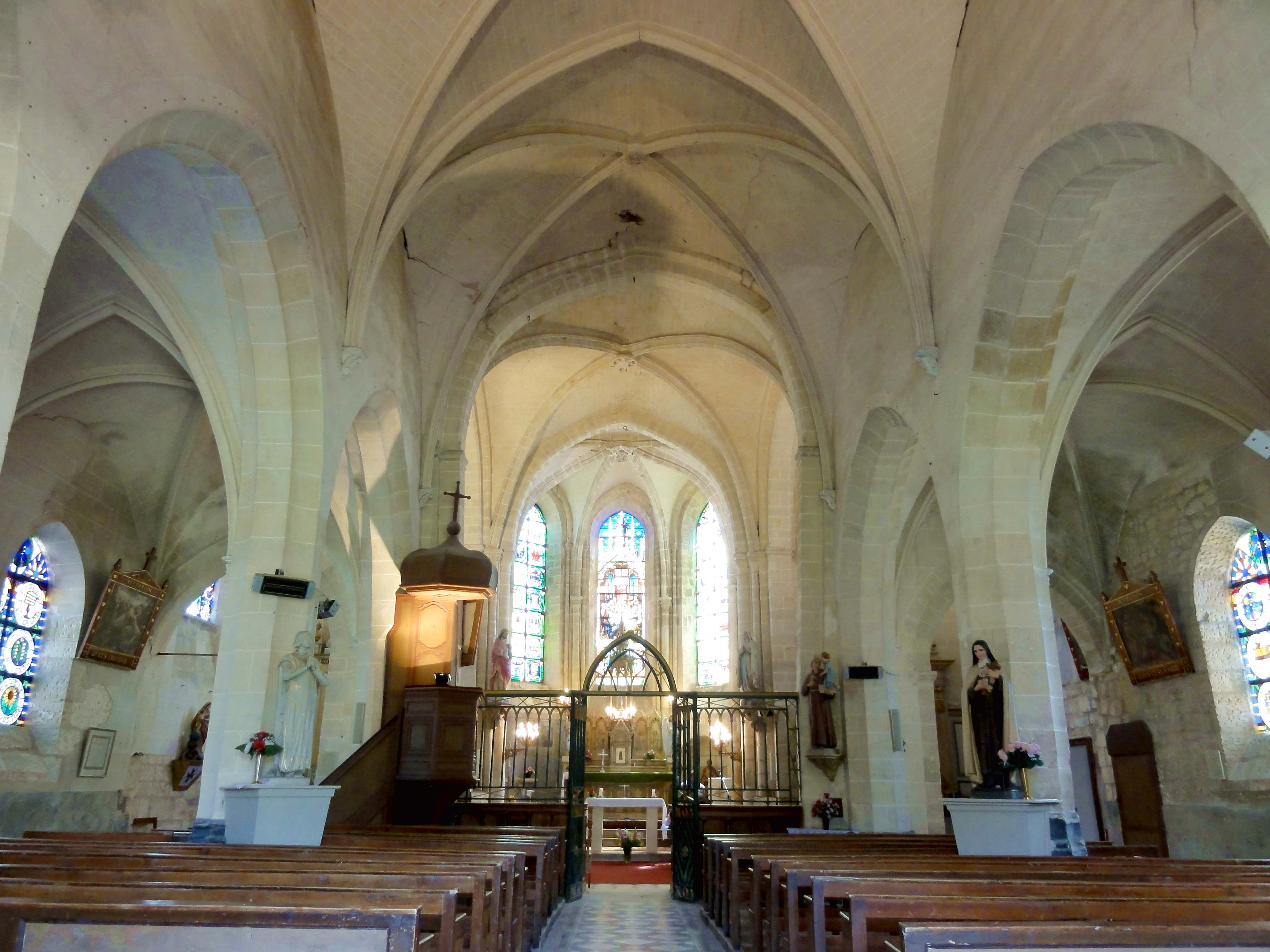 Intérieur de l'église Saint-Nicolas de Jonquières (voir titre).